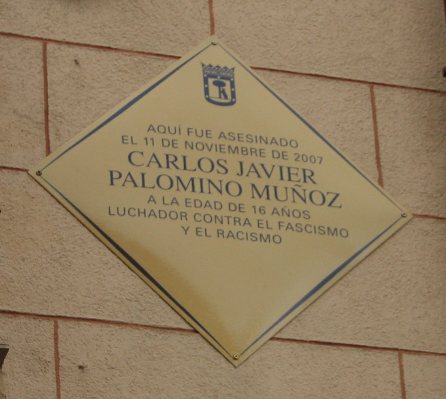 La placa a Carlos Palomino se ha colocado en el paseo de Delicias 145, donde murió asesinado Carlos Palomino el 11 de noviembre de 2007